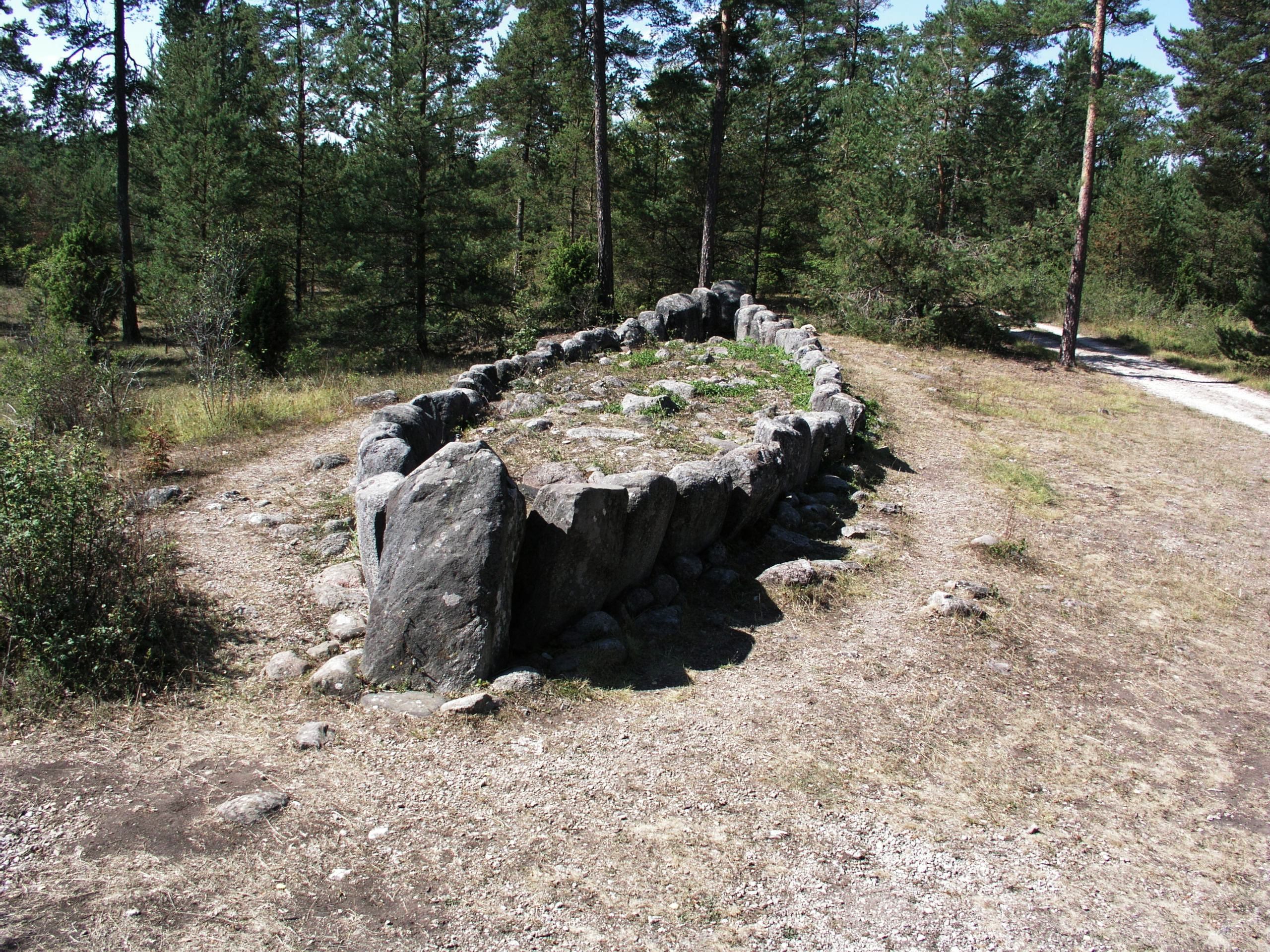 Tjelvars grav / The grave of Tjelvar. Gotland, Sweden.